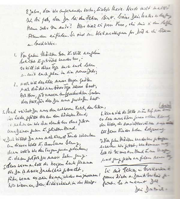 Dietrich Bonhoeffer, Autograph des Gedichts Von guten Mächten in seinem Brief an Maria von Wedemeyer aus dem Kellergefängnis des Reichssicherheitshauptamts in Berlin, Prinz-Albrecht-Straße, 19. Dezember 1944, Houghton Library at Harvard University LocationCambridge, MassachusettsCoordinates42° 22′ 23″ N, 71° 06′ 57″ W Established1942Website control VIAF: 155530939 ISNI: 0000 0001 2190 4234 ULAN: 500307208 LCCN: n80097499 NLA: 36125461 WorldCat , MS Ger 161, (43)